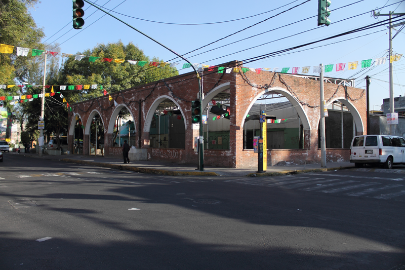 Plaza Civica San Andres Tetepilco, lugar de esparcimiento y cultura para la colonia.